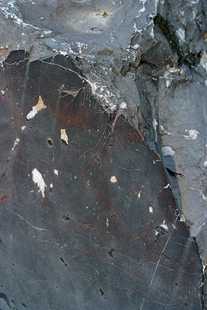 Wildegg: (Holcim) Schwarzer Kalk von St-Triphon (Nr. 03.1-5090)